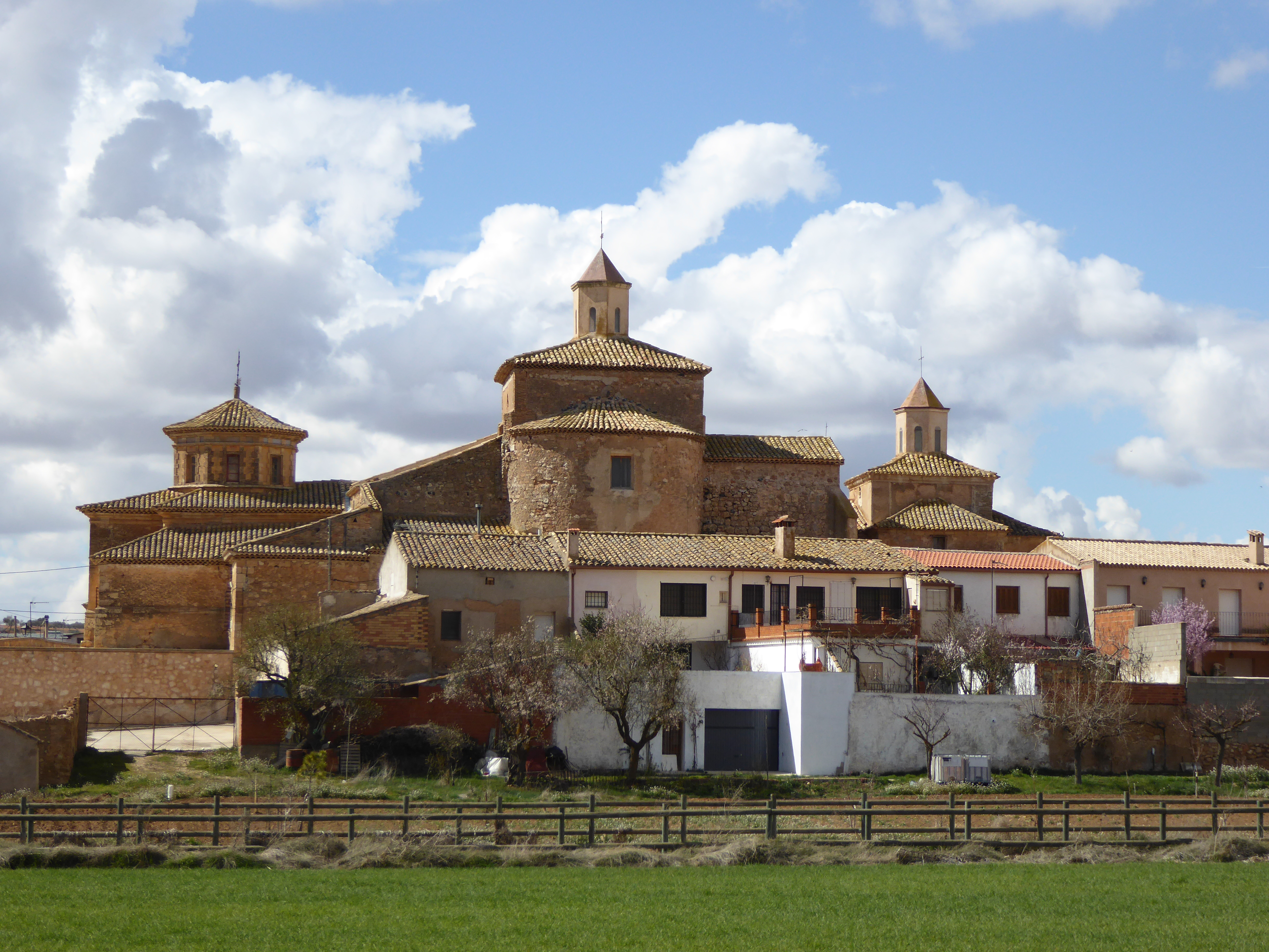 Buenache de Alarcón